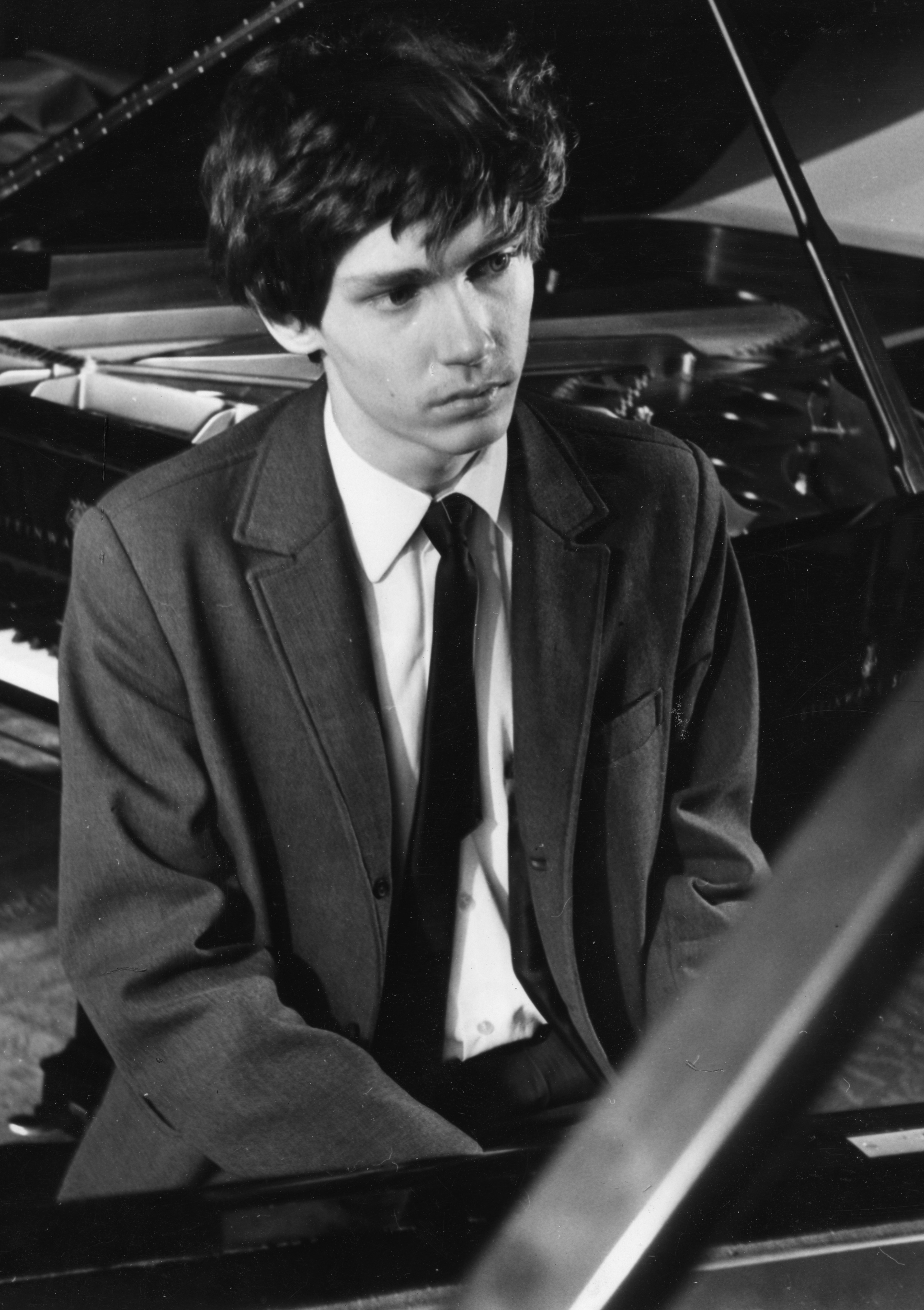 Kocsis Zoltán 20 éves korában (1972)